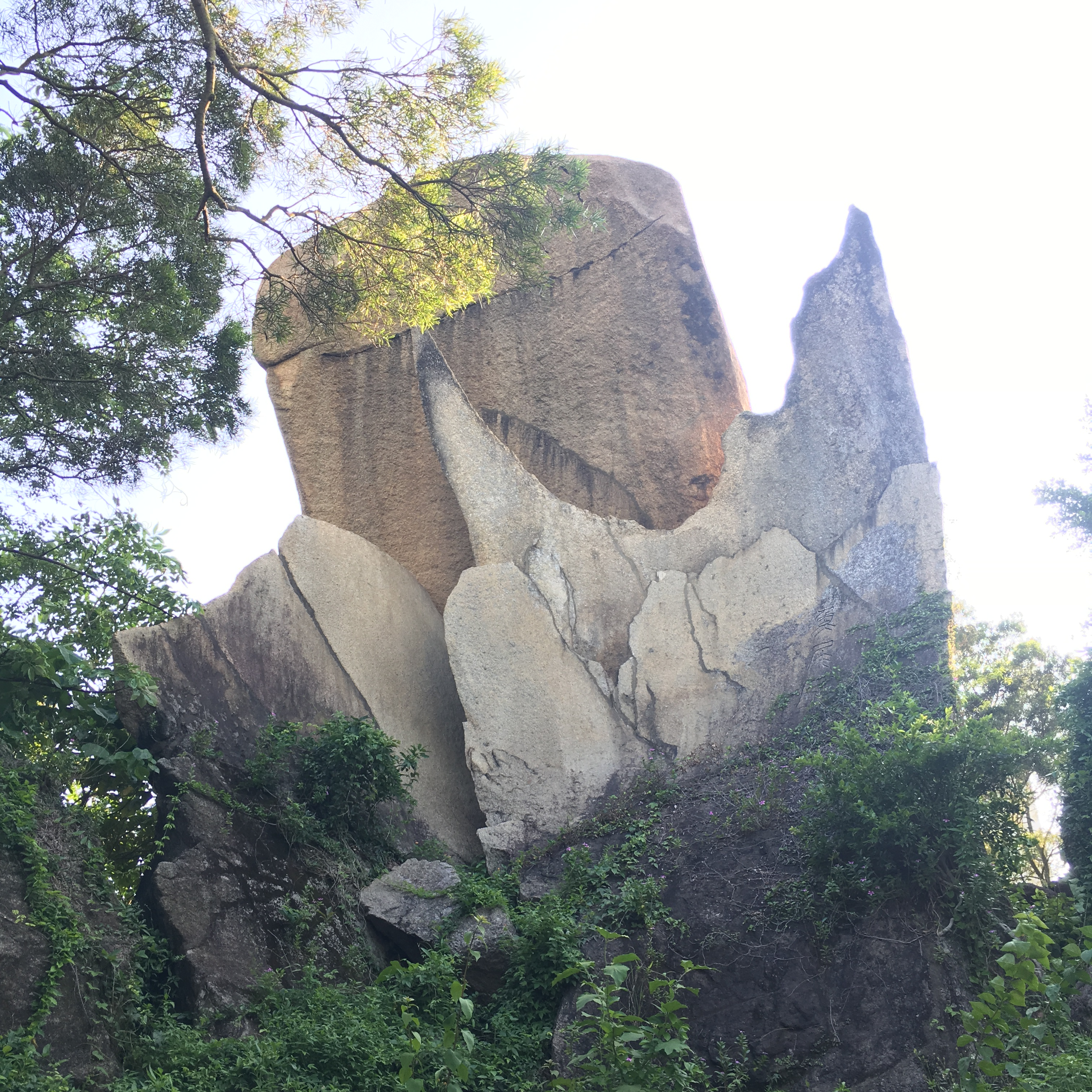 The Fishtail Rock that was once on Hoi Sham Island, after the land reclamation, it was now located inside Hoi Sham Park